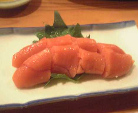 たらこ（居酒屋で。2005年5月投稿者が撮影）